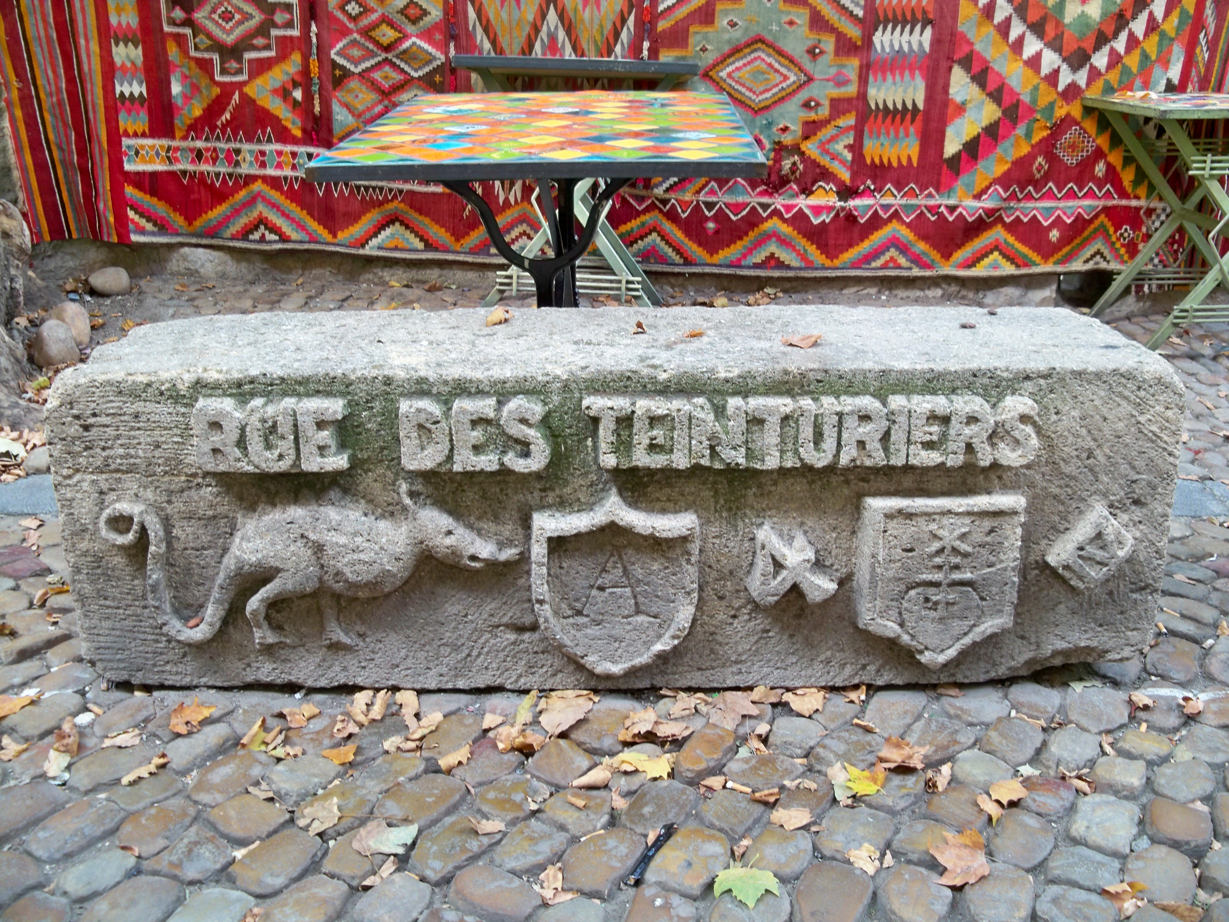 Pierre rue des teinturiers, Avignon, Vaucluse